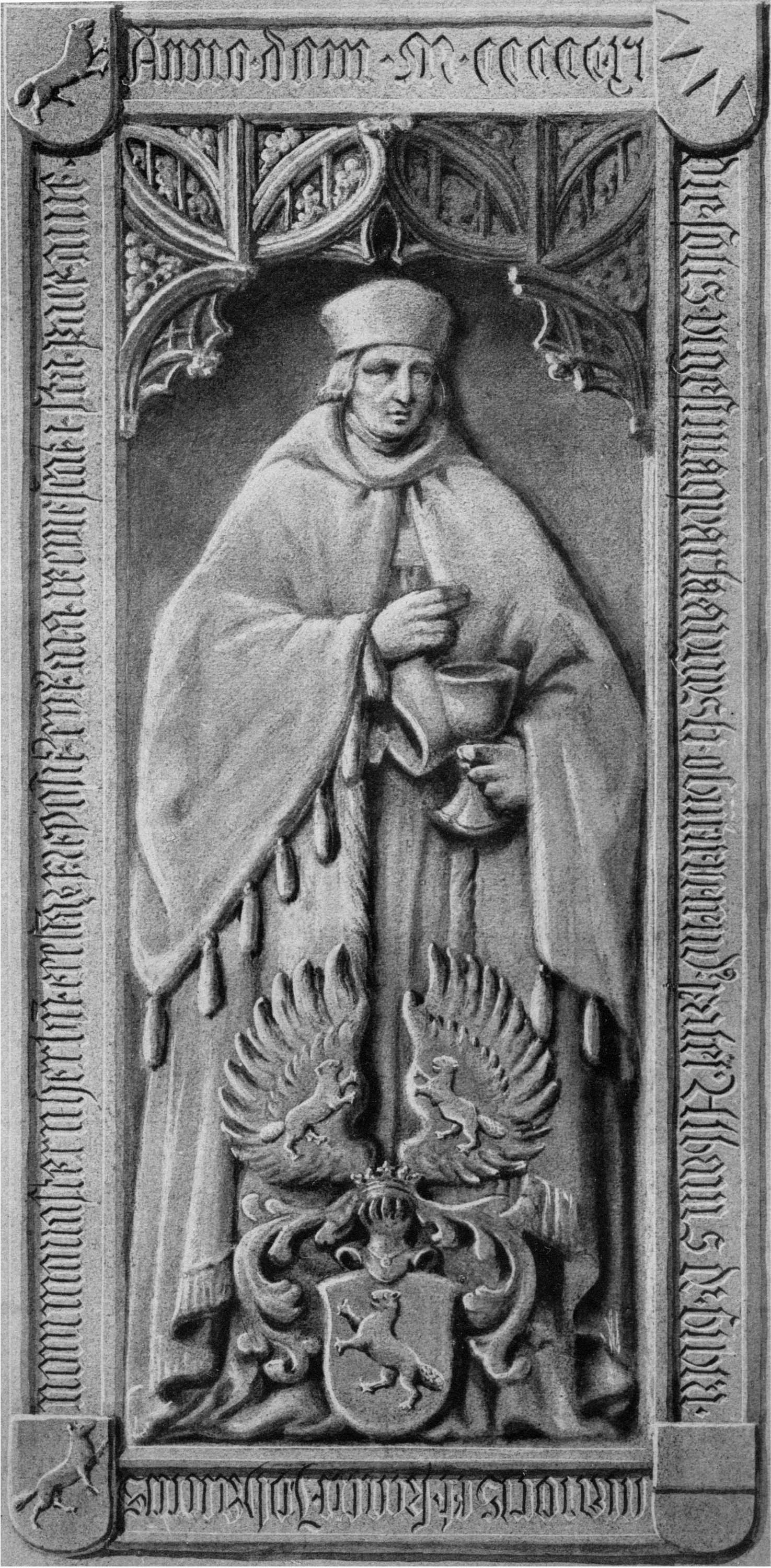 Print of Albrecht von Bibra grave at Wuerzburg Dom